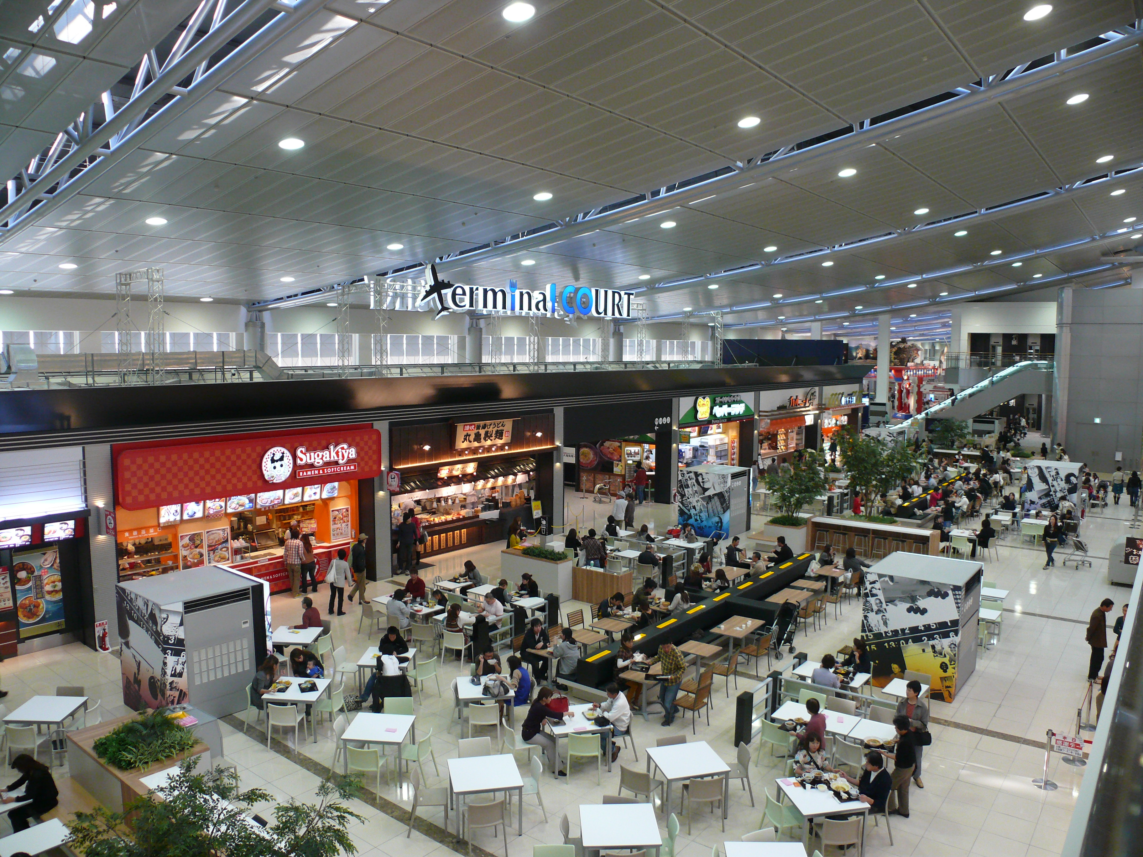 愛知県西春日井郡豊山町にあるエアポートウォーク名古屋（注：エアポートウォーク名古屋は店内での撮影が禁止されていない）